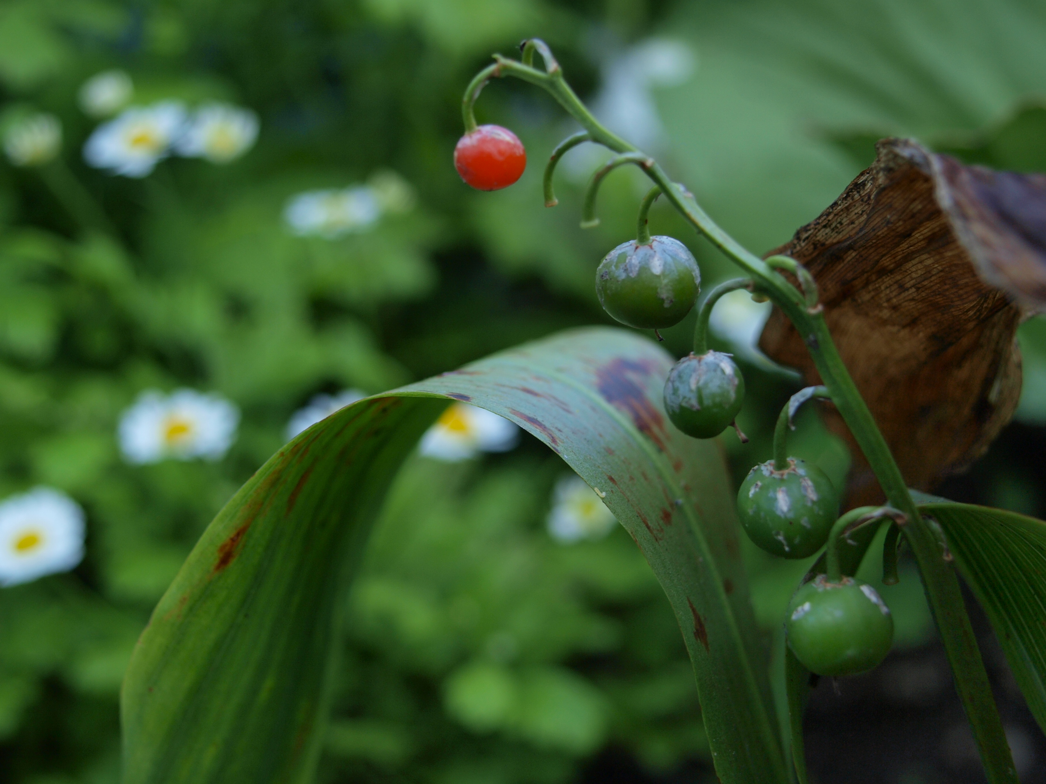 Pildil piibelehe ehk maikellukese (Convallaria majalis L.) marjad